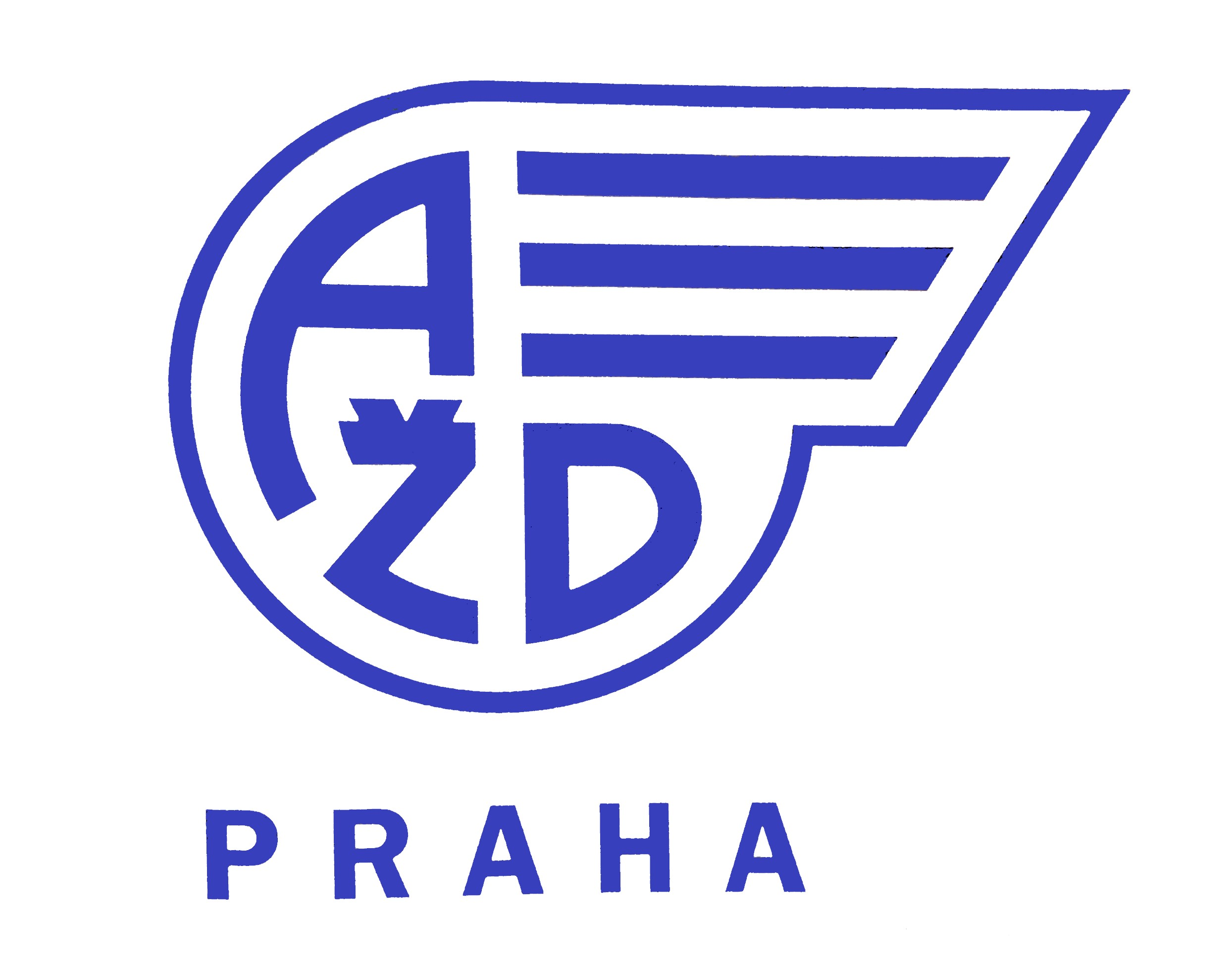 AŽD Praha logo